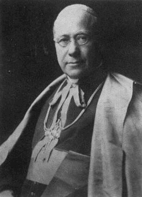 Mořic Pícha (1869 - 1956), Český duchovní a 22. biskup královéhradecký.